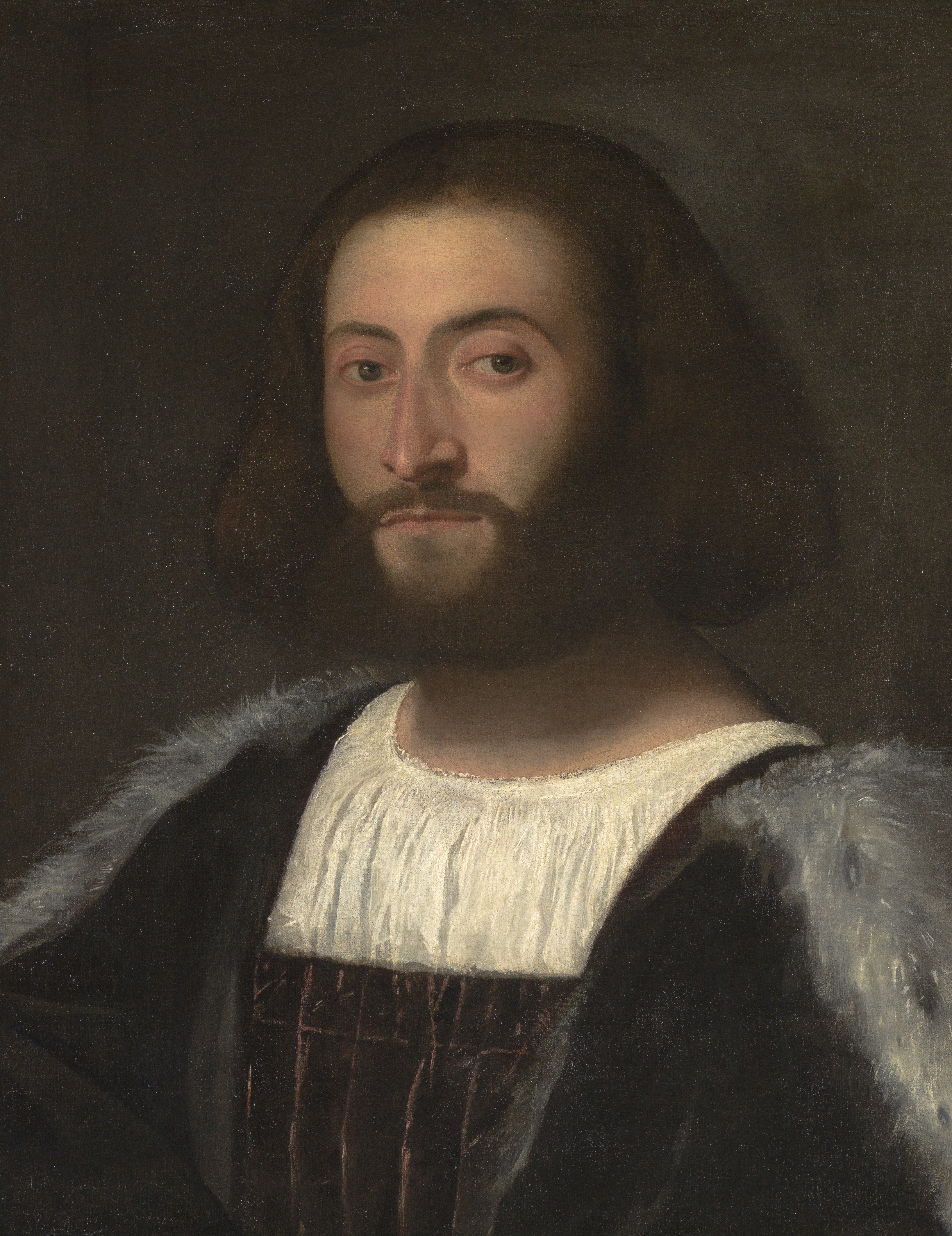 Tiziano, ritratto indianapolis